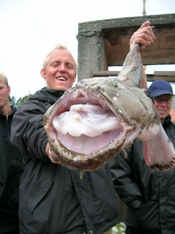 En mann med sin bredflabb